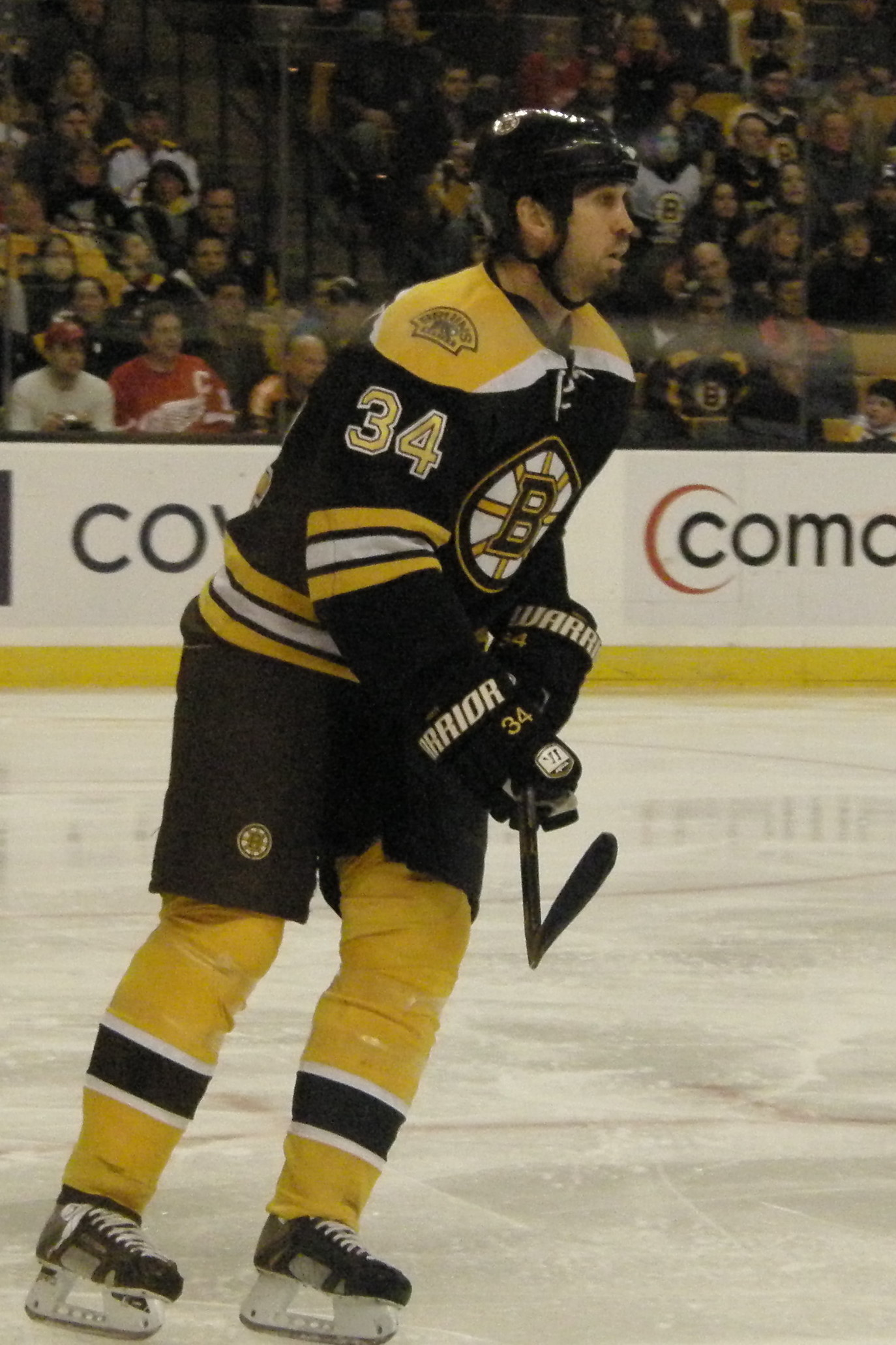 #34 Shane Hnidy (D)